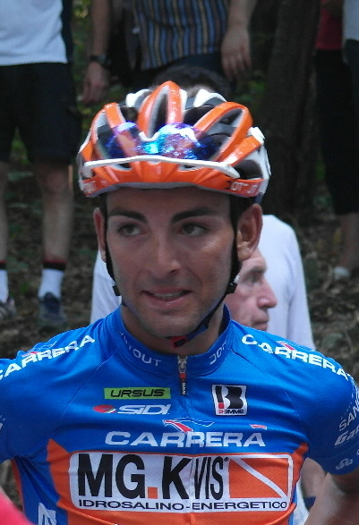 Michele Gazzara al 2015